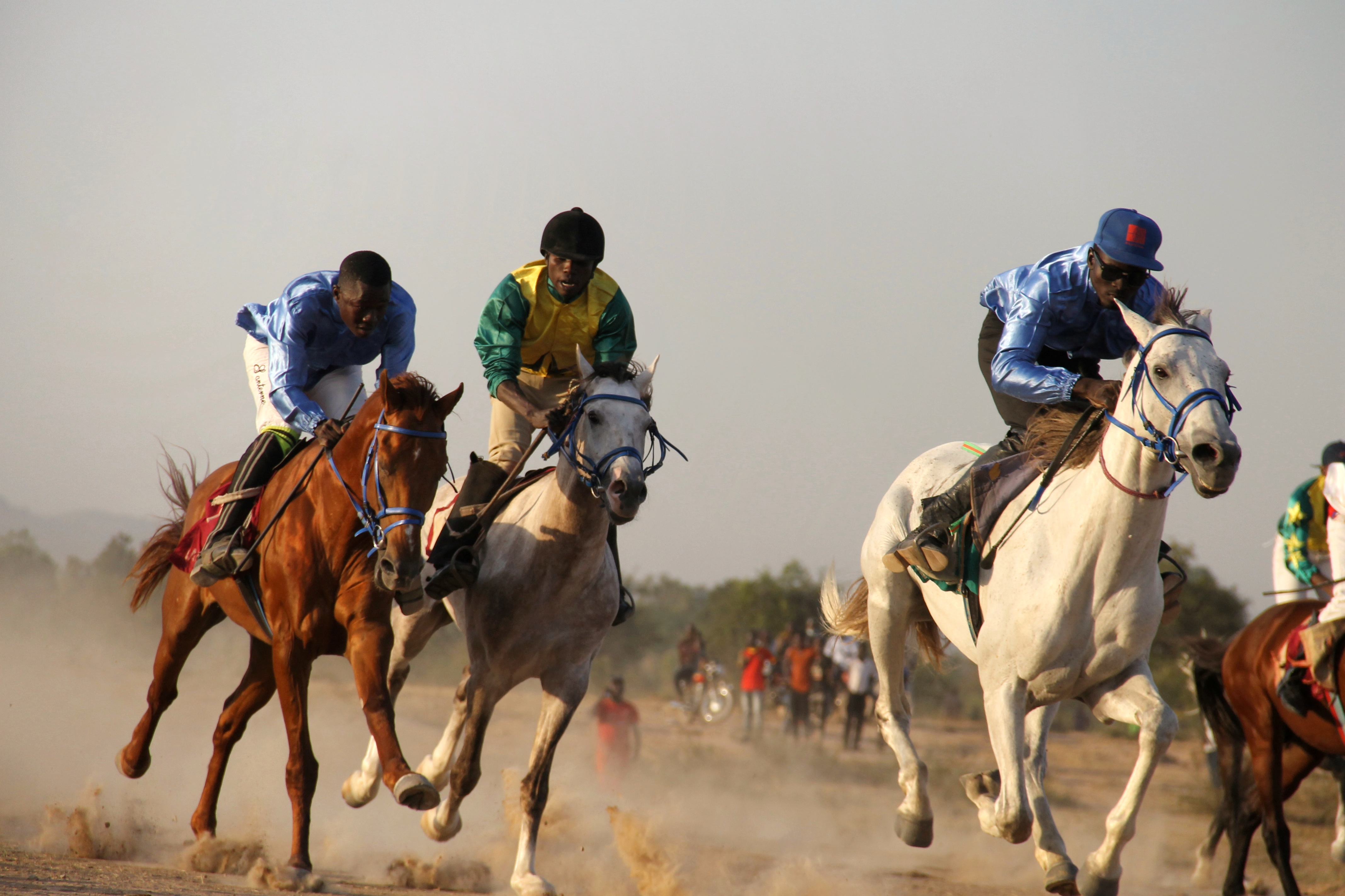 Cavaliers à Gashiga dans le nord Cameroun This is an image with the theme "Africa on the Move or Transport" from: Cameroon